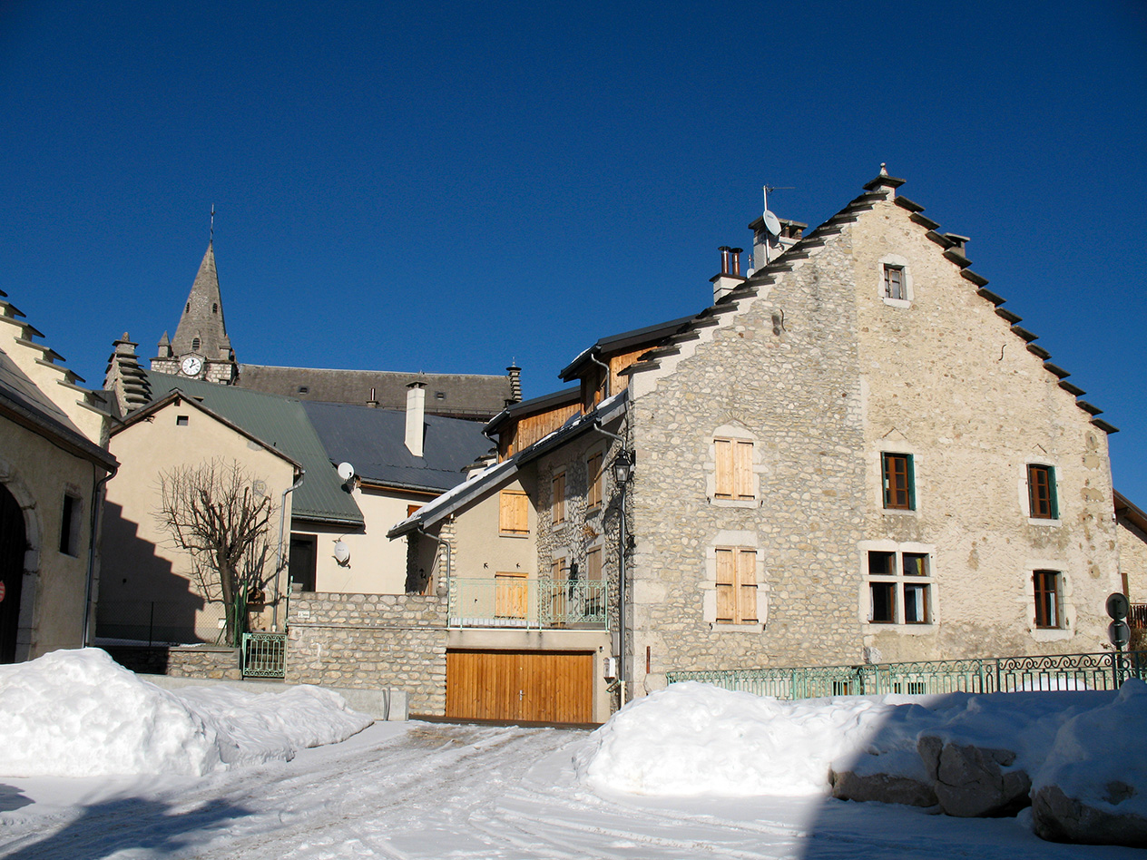 Autrans sous la neige lors des rencontres 2009 des acteurs de l’internet.